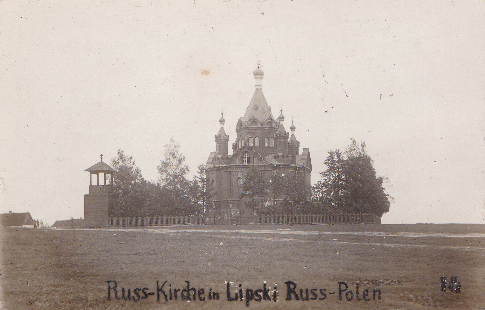 Беларуская (тарашкевіца): Ліпск (Lipsk). Багародзіцкая царква-мураўёўка